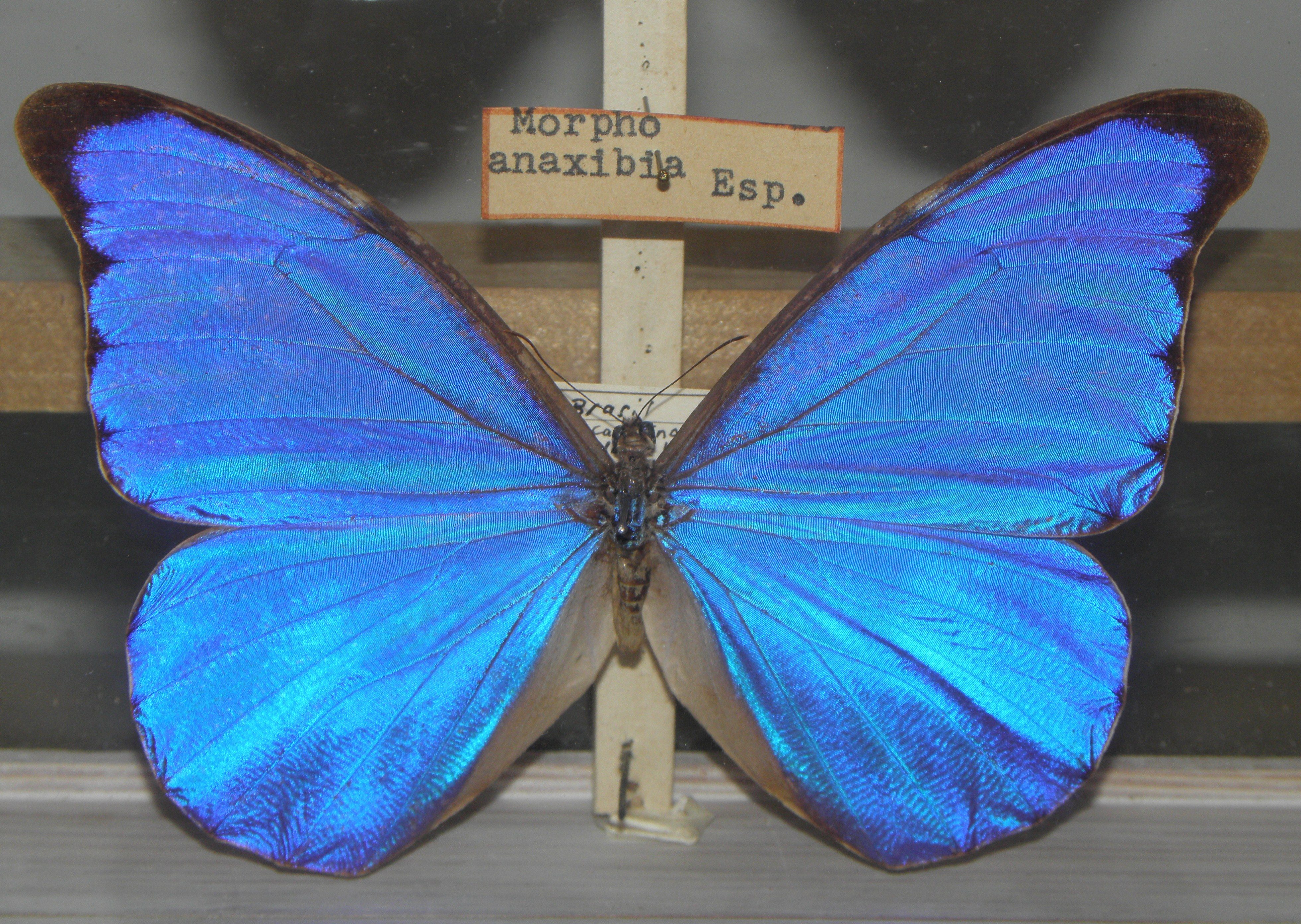 Morpho anaxibia.